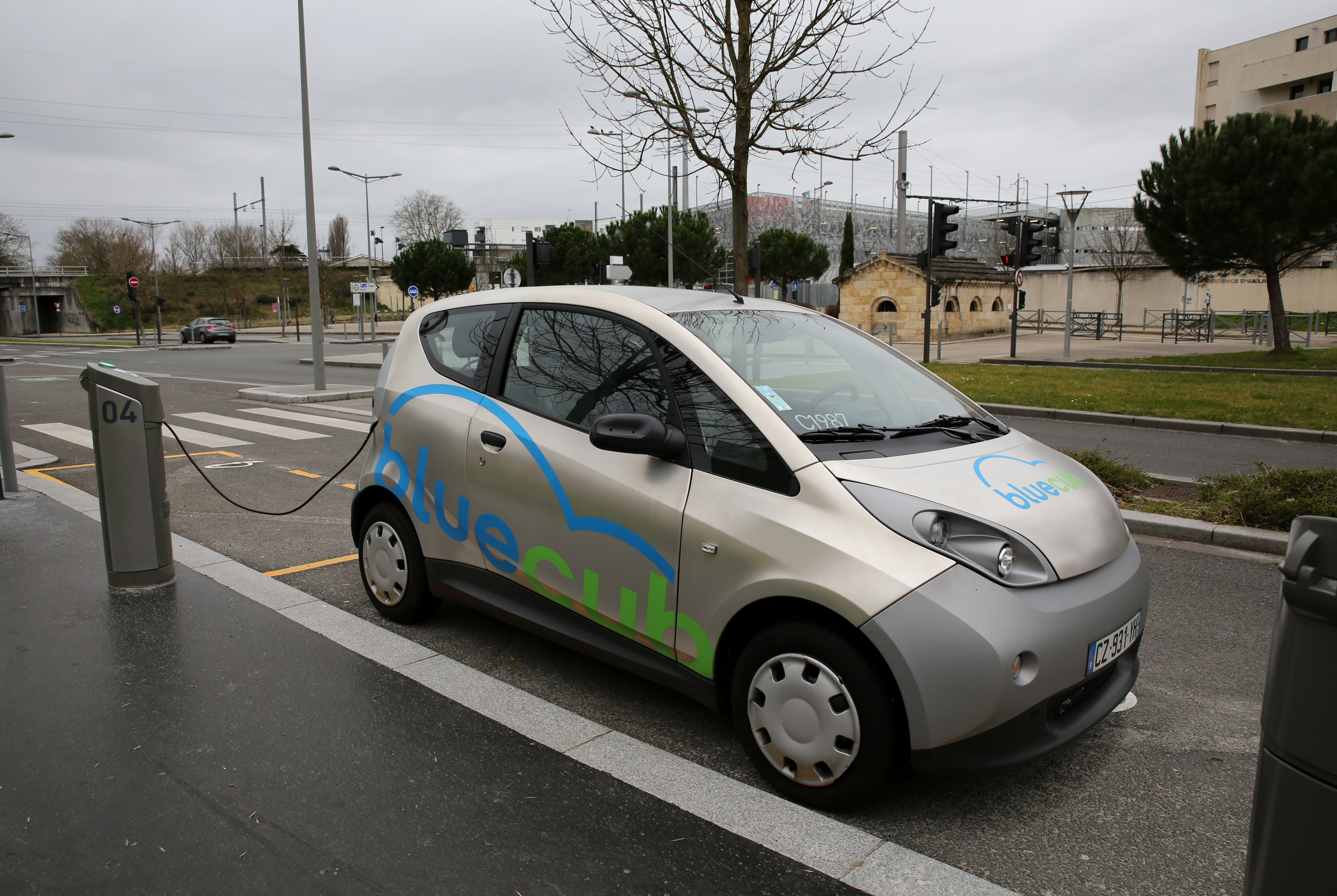 Voiture électrique Bolloré Bluecar en charge devant la Fontaine d'Arlac, la station de tram et son parking P+r